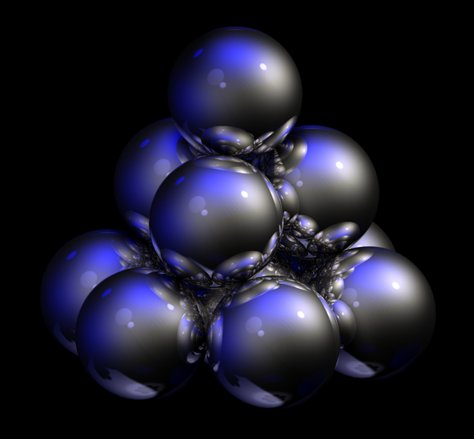 see below